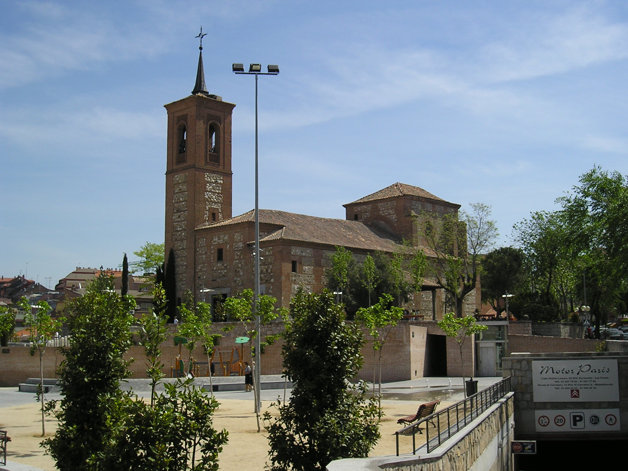 Iglesia San Miguel Arcangel de Las Rozas, obtenida por Santiago Agueda Alonso para la wikipedia